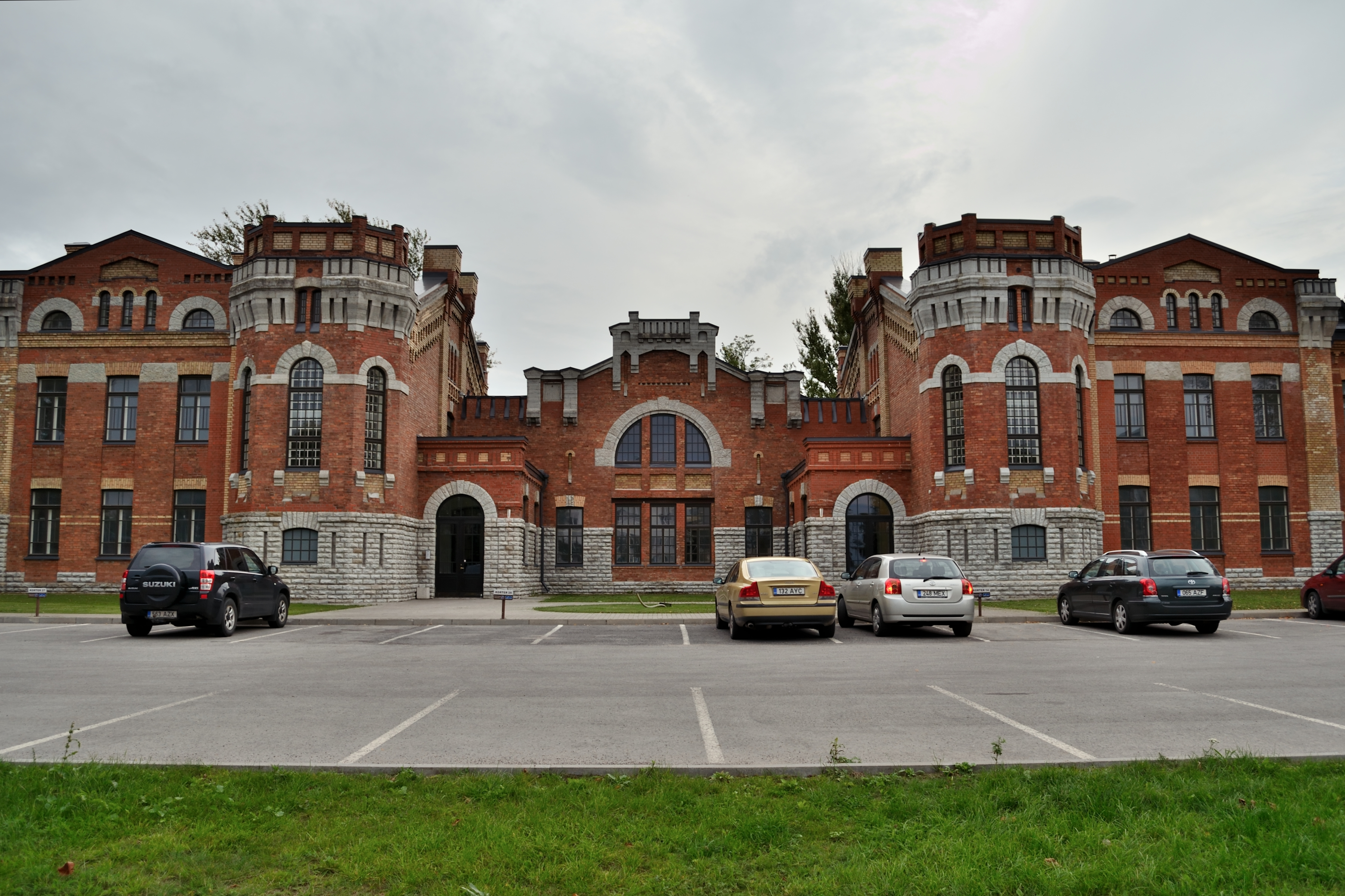 Tondi sõjaväelinnaku kasarm Tondi 51, 1915-1916